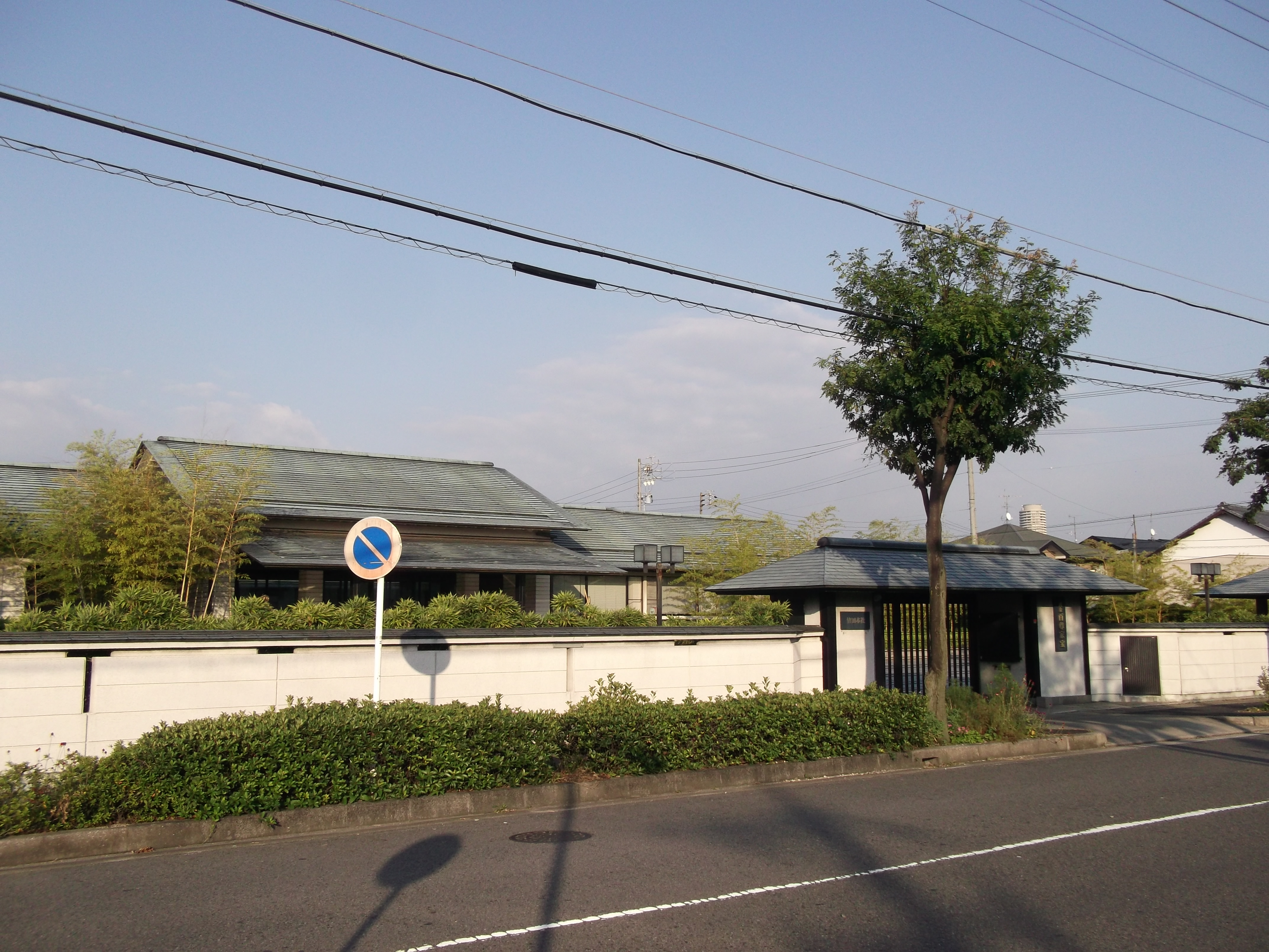 名古屋市西区大野木の竹田本社・純金百尊家宝を南西側公道より撮影